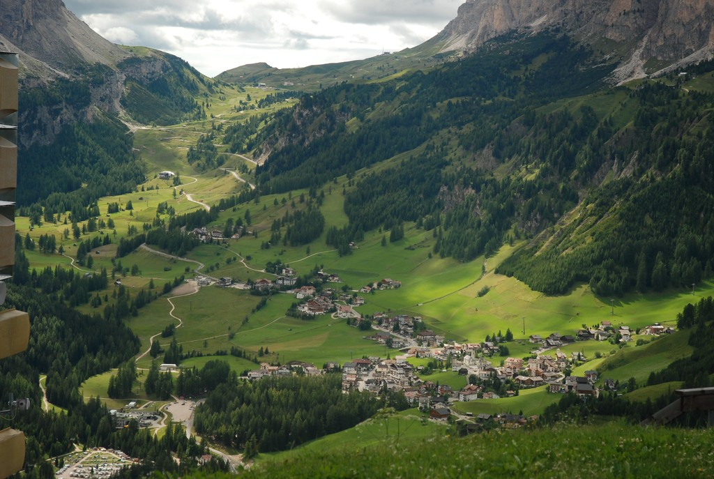 Veduta di Colfosco (Corvara in Badia) e del Passo Gardena dal Col Alto.